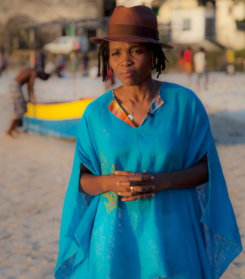 La journaliste de TV5Monde, Lise-Laure Etia, avant un plateau pour son magazine Continent noir, plage d'Instandra aux Comores, le 16 juin 2012.